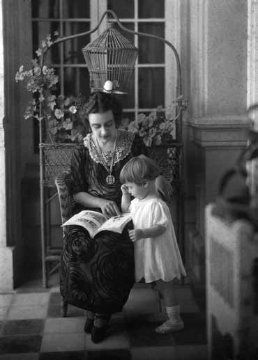 La dulzura maternal de Rosario Garza Sada es más que patente en esta hermosa fotografía. La pequeña es su hija Cecilia. Doña Rosario, por esos años, fundó la Clínica y Maternidad Conchita, de respetable y noble trayectoria. Ca. 1925 Colección particular